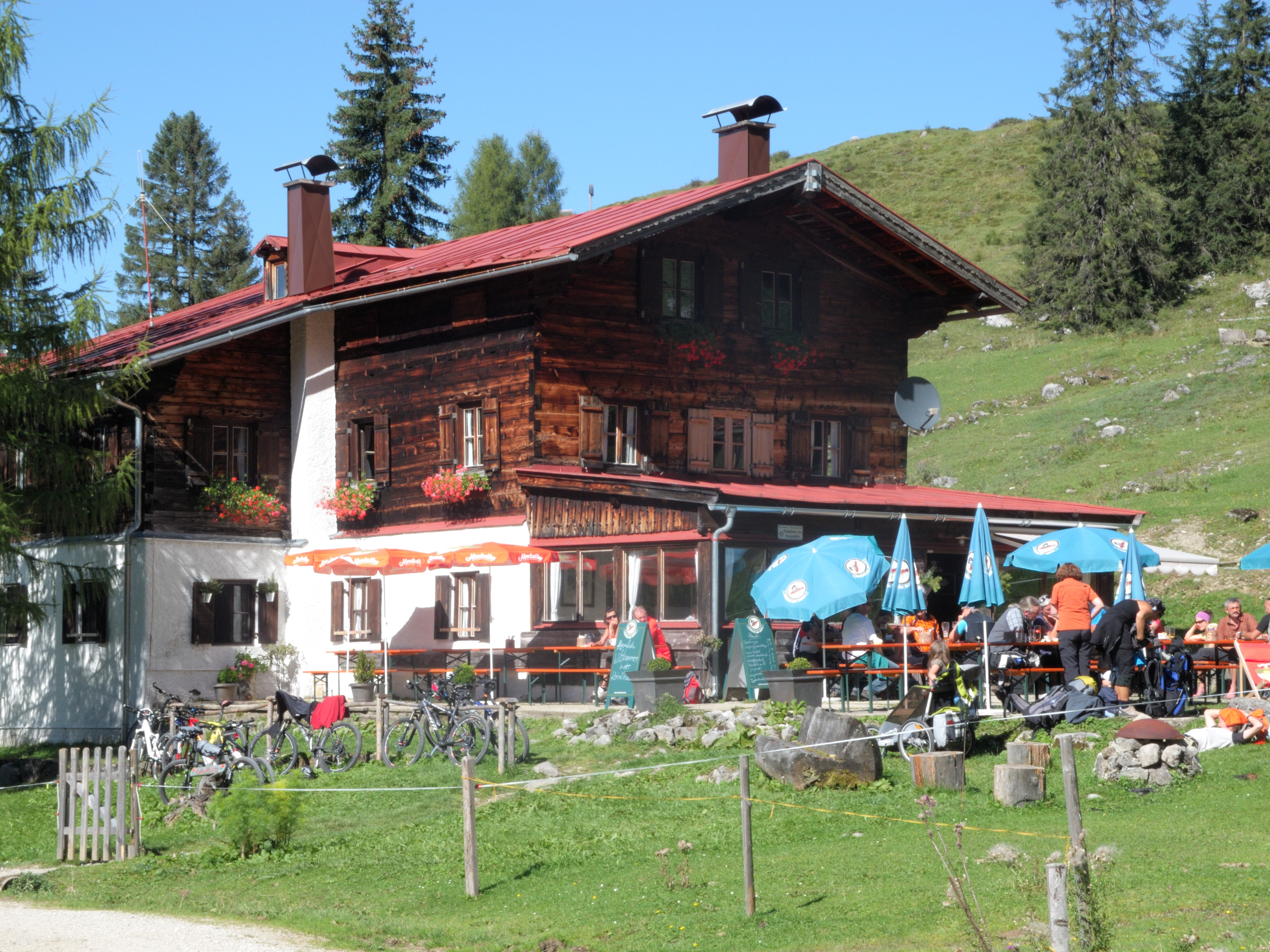 Kaindlhütte im Kaisergebirge/Tirol